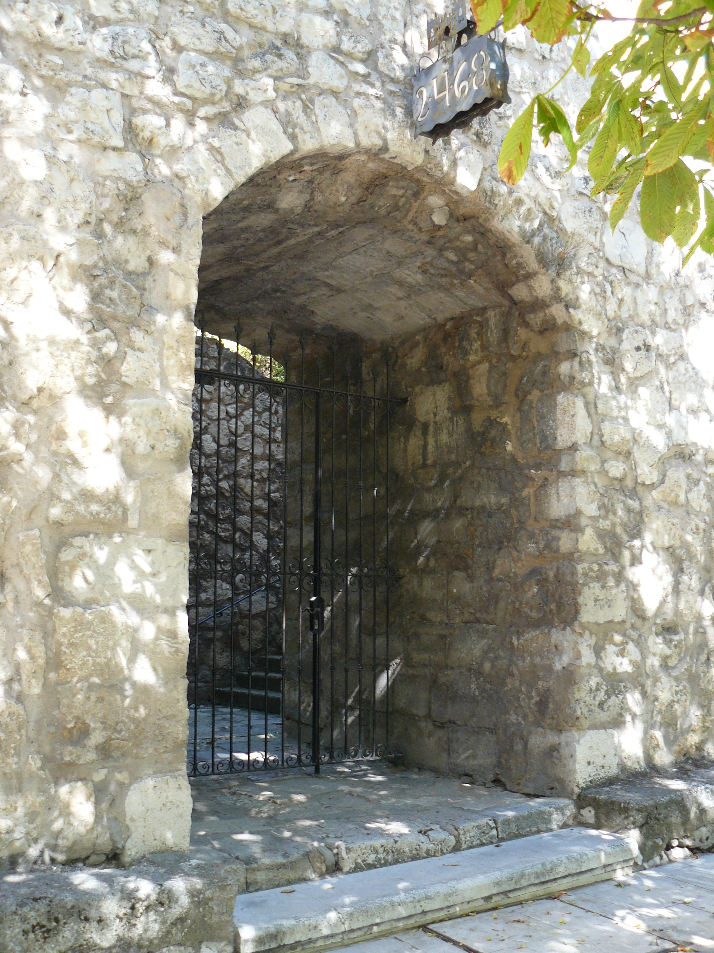 Murallas de Burgos.